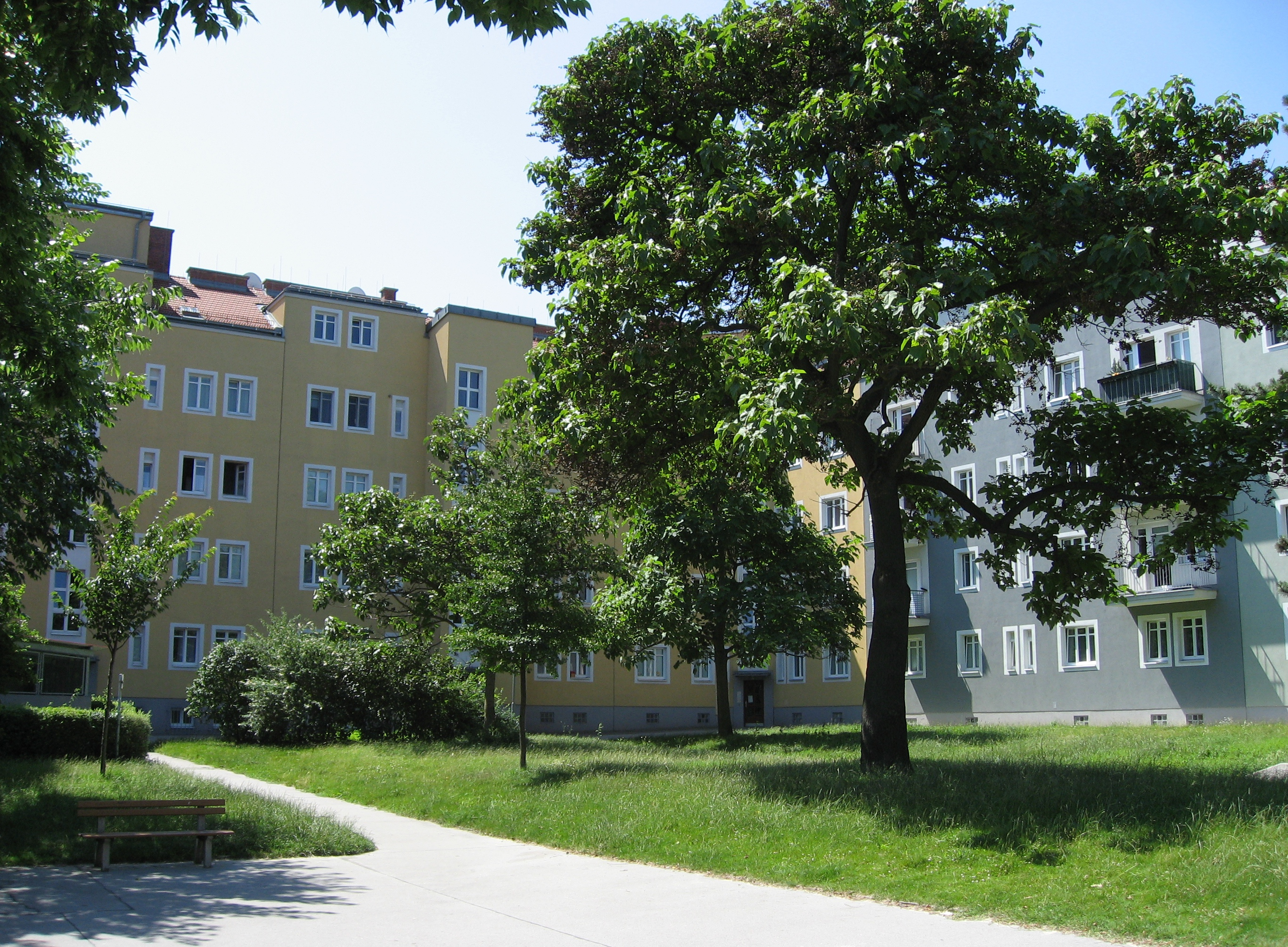 Gemeindebau Simmeringer Hauptstraße 140–150 Innenhof This media shows the Vienna residential building (Gemeindebau) with the ID 823.